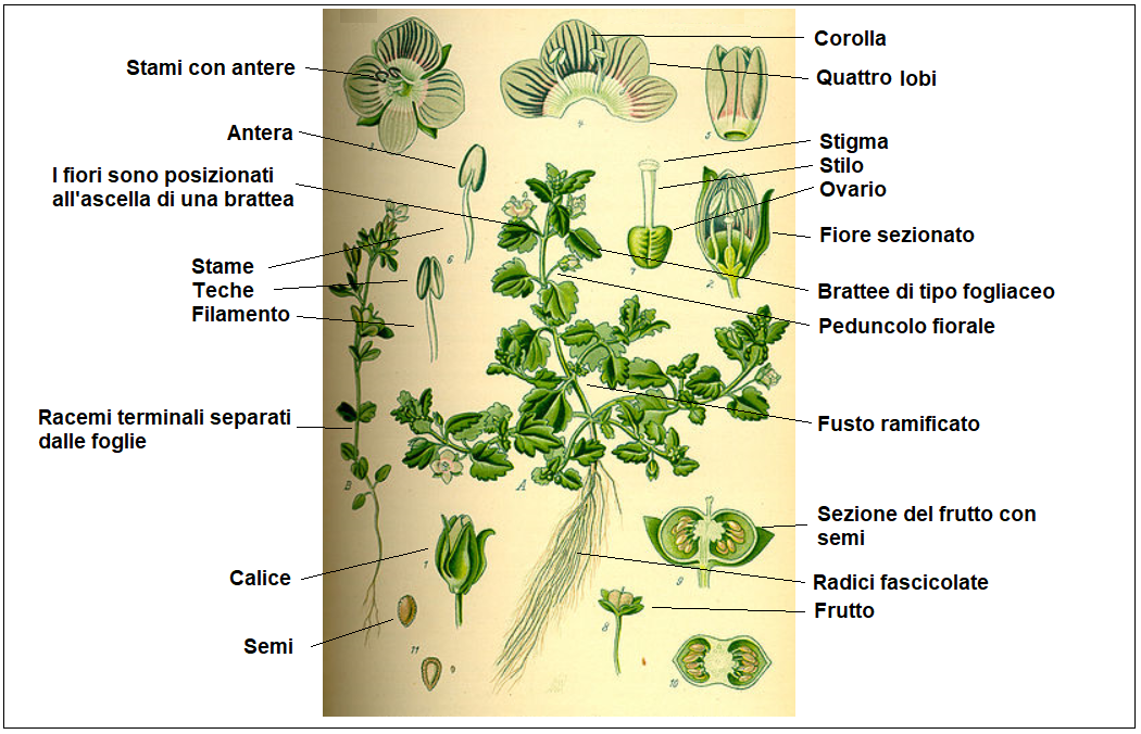 Illustration Veronica triphyllos